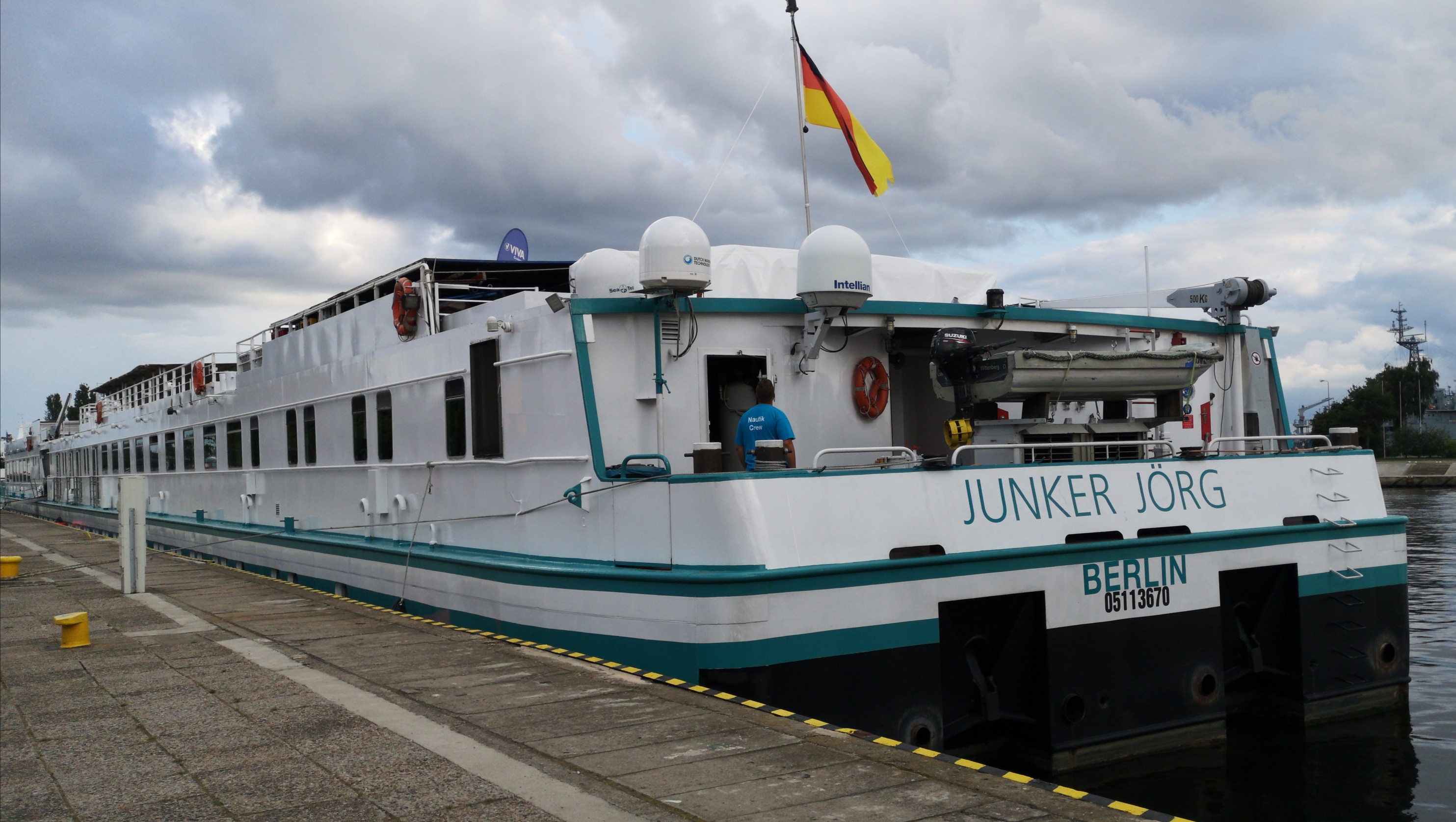 MS Junker Jörg (vormals MS Theodor Fontane) im Hafen von Swinemünde, Polen